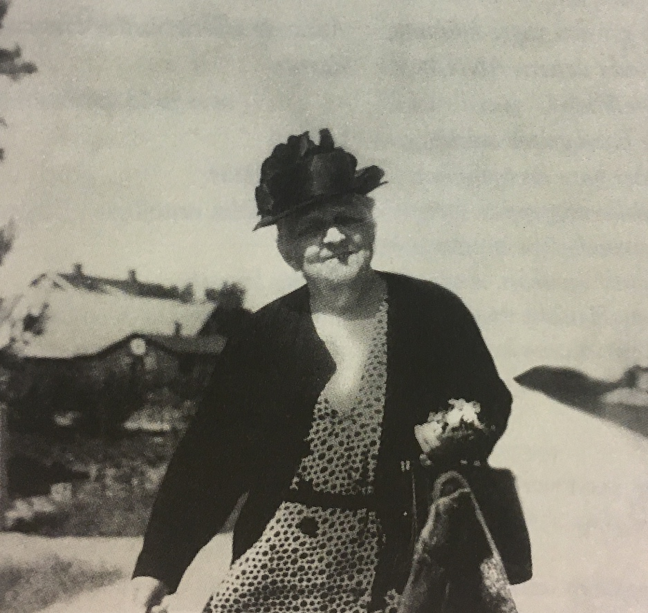 Anna i Halland omkring år 1945. IMG 9209